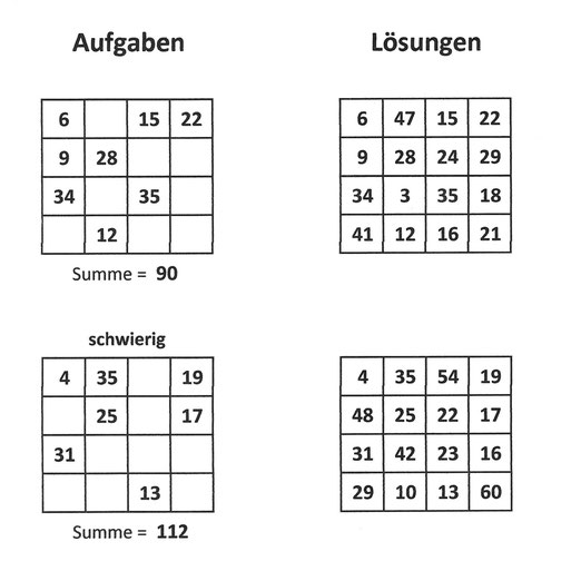 Beispiele und Lösungen